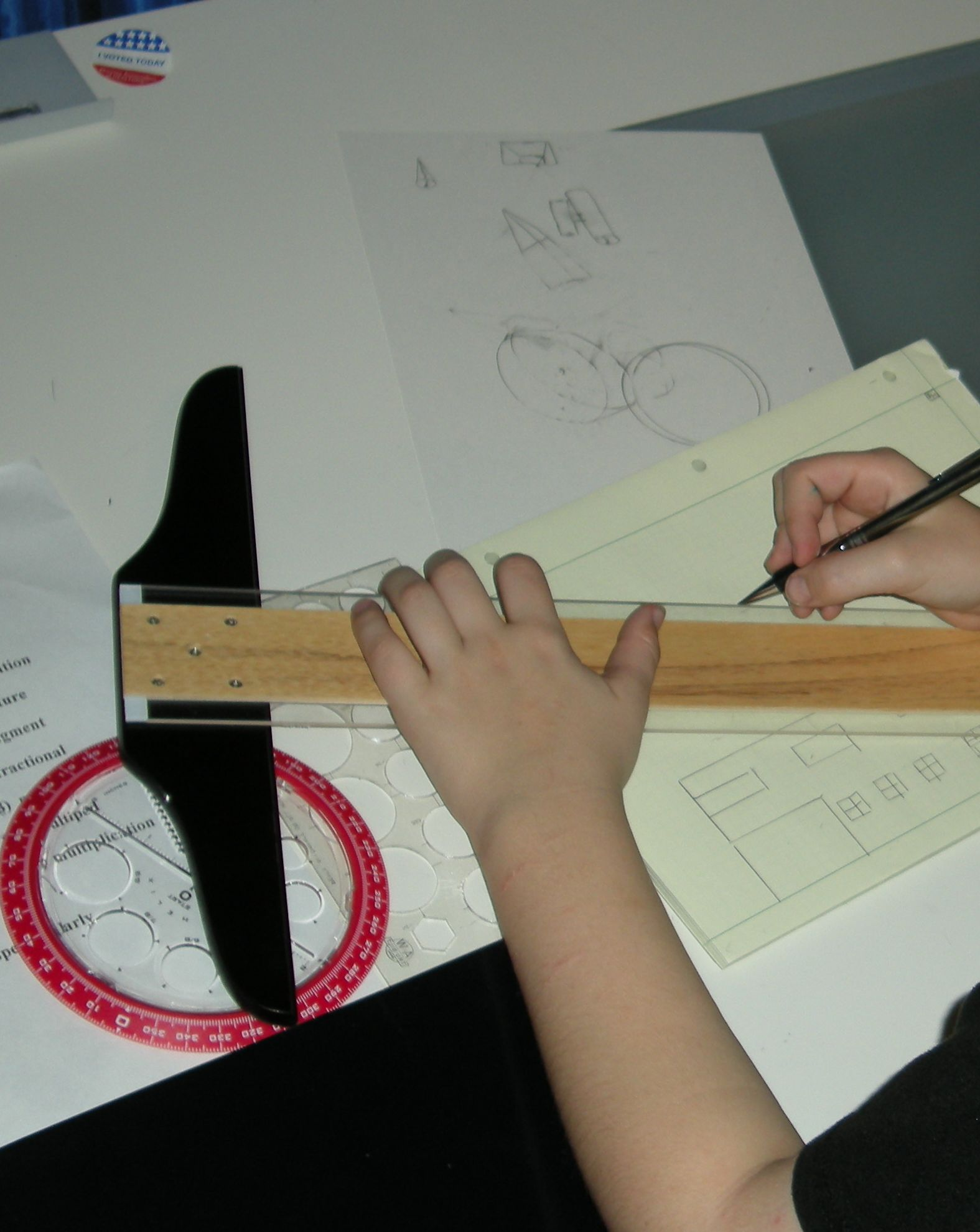 Engineer Avynn